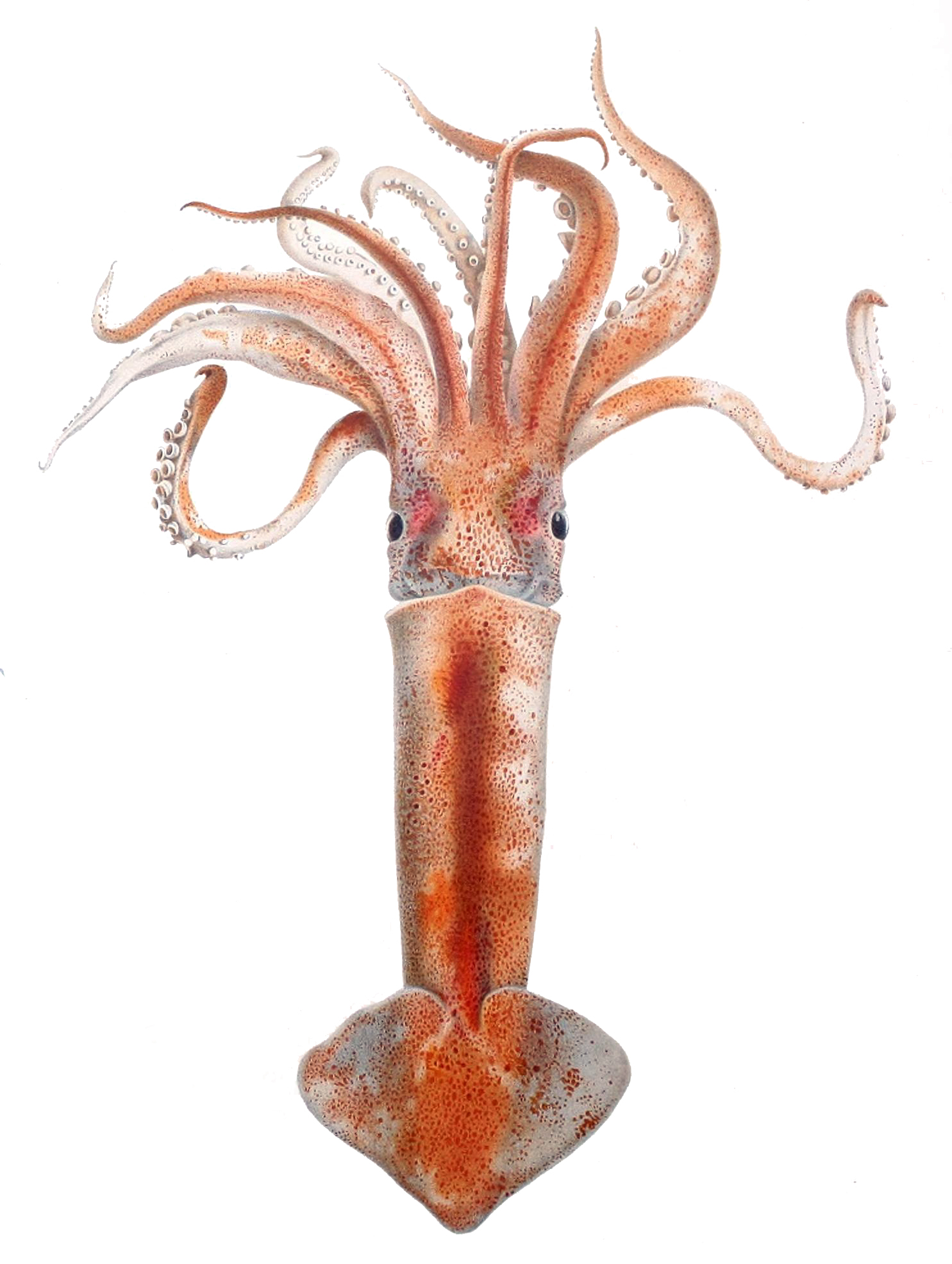 Todaropsis eblanae